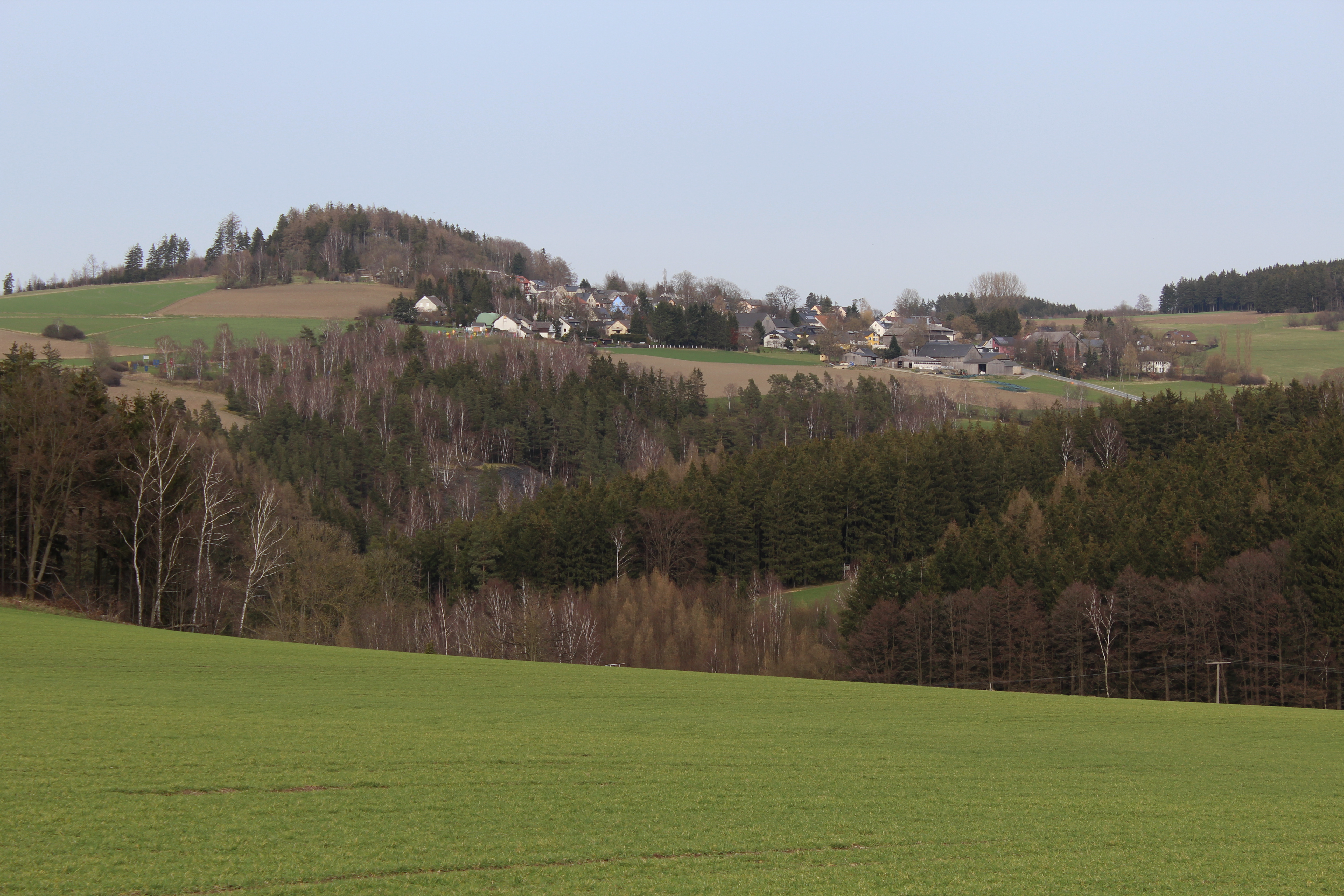 Eisenbühl von Kemlas aus fotografiert